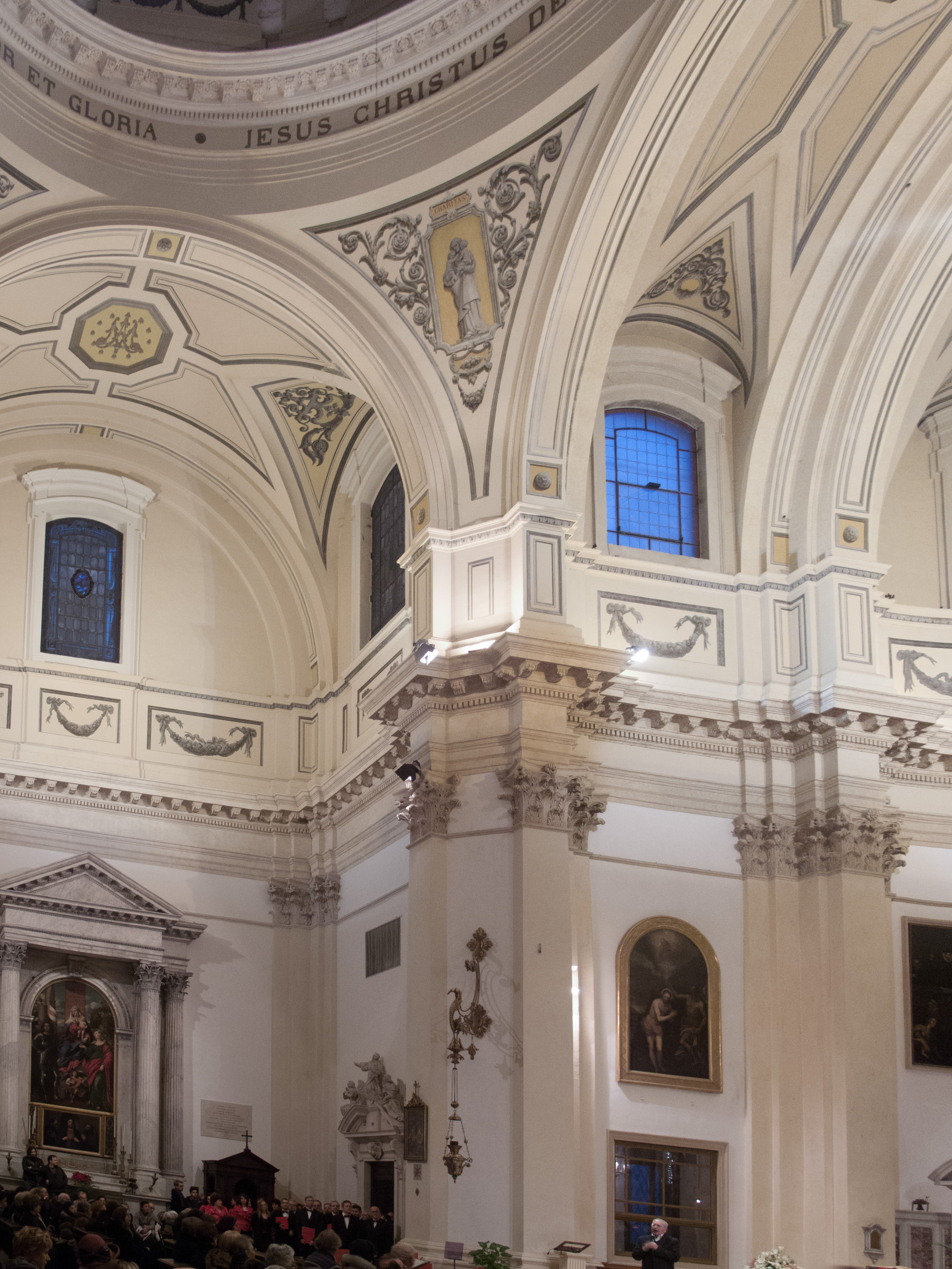 Vicenza - Chiesa di Santo Stefano - interno